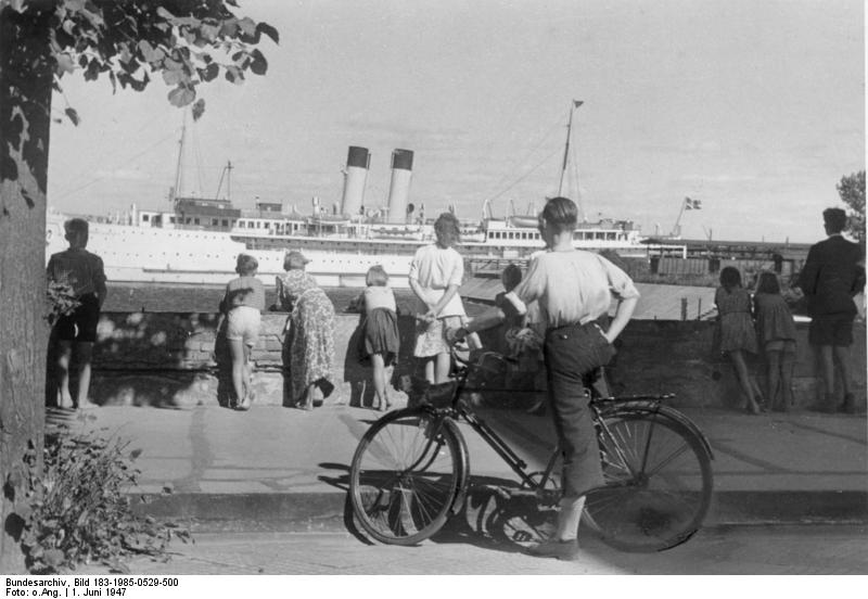 ADN-ZB/Archiv Sowjetische Besatzungszone Deutschland / Warnemünde: [1947] Nachdem 1944 der Fährverkehr auf der Ostsee eingestellt worden war, wurden beide Routen - Warnemünde -Gedser ab 10.5.1947 und Warnemünde-Trelleborg ab 1.6.1947 mit dänischen bzw. schwedischen Fährschiffen wieder in Betrieb genommen. Wenige Jahre später wurde wieder die traditionelle Route Saßnitz-Trelleborg befahren. Im Hafen von Warnemünde fährt das erste schwedische Fährschiff "Konung Gustav V." (Linie Warnemünde-Trelleborg) ein. [Aufnahme: Vitanova] 5222-50